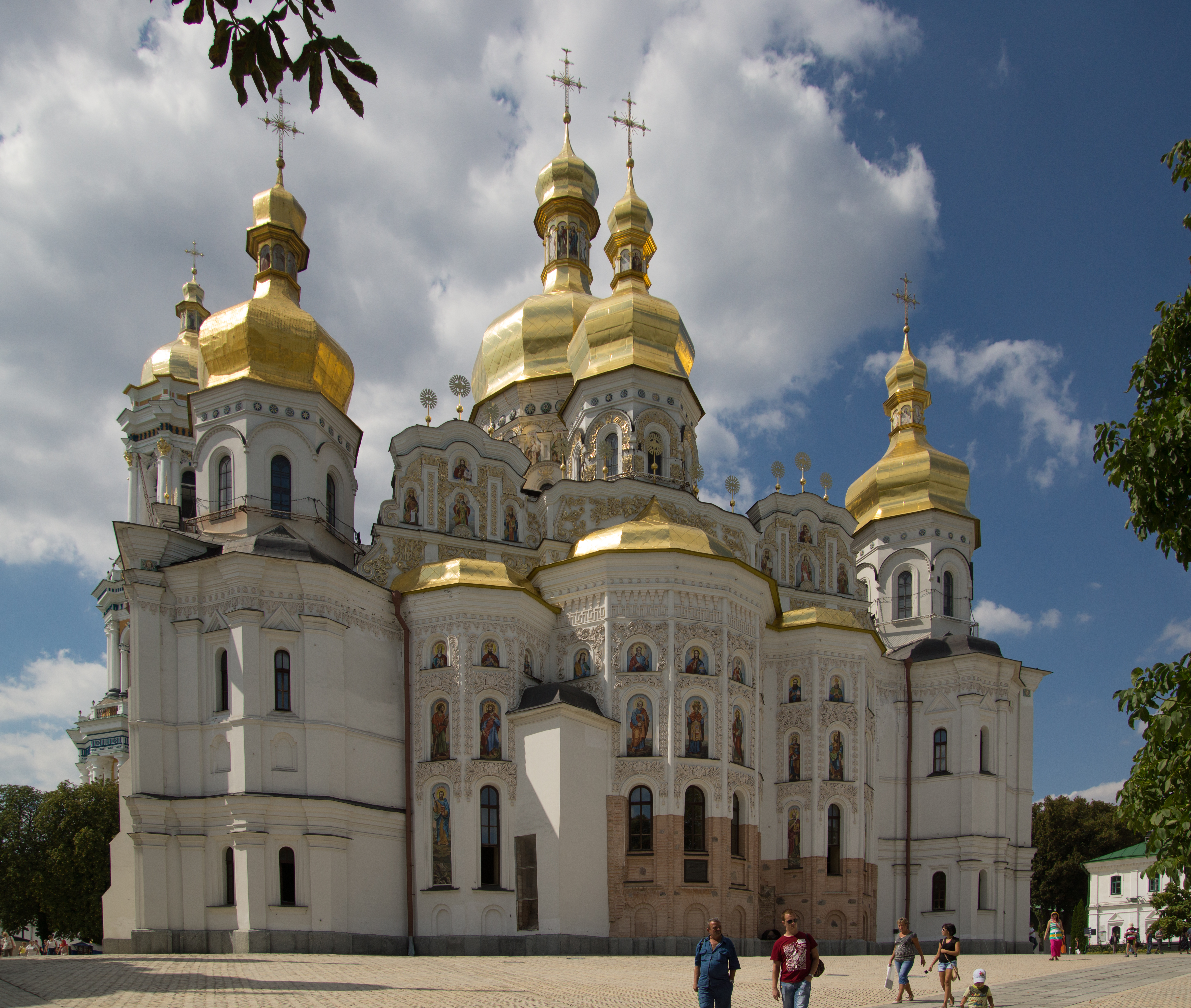 Catedral de la ASuncion